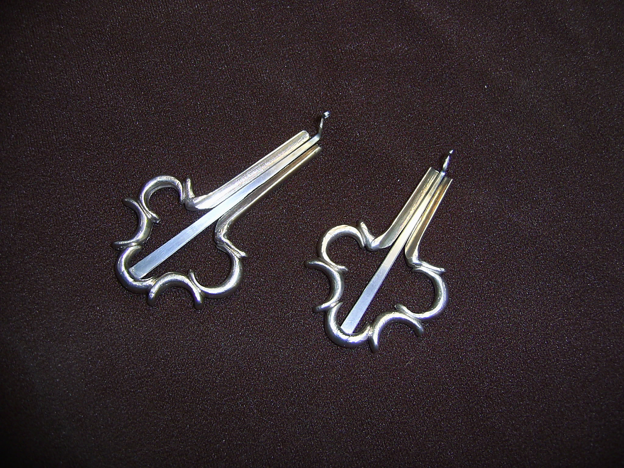 Nachbau von Historischen Maultrommeln aus Deutschland